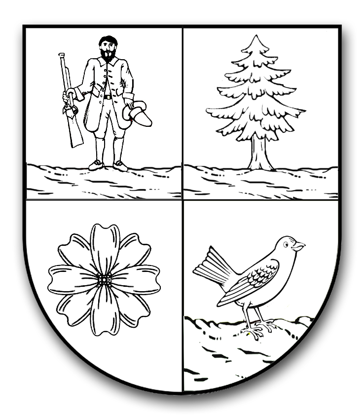 Brasão Sartori de Croviana